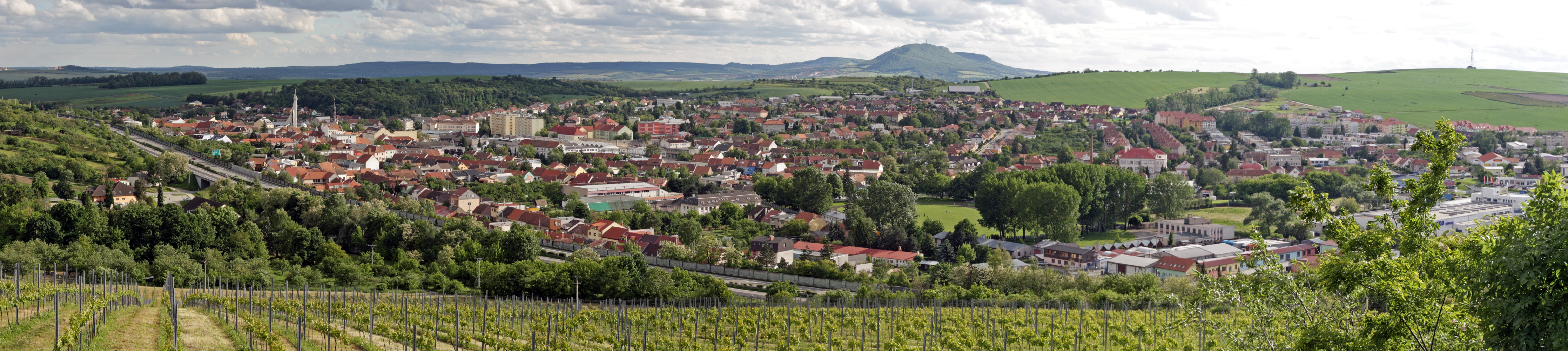 Hustopeče - panorama od severovýchodu, pohled ze Starého vrchu. Na levém okraji města prochází dálnice D2. V pozadí je vidět Pavlovské vrchy s masivem Děvína.